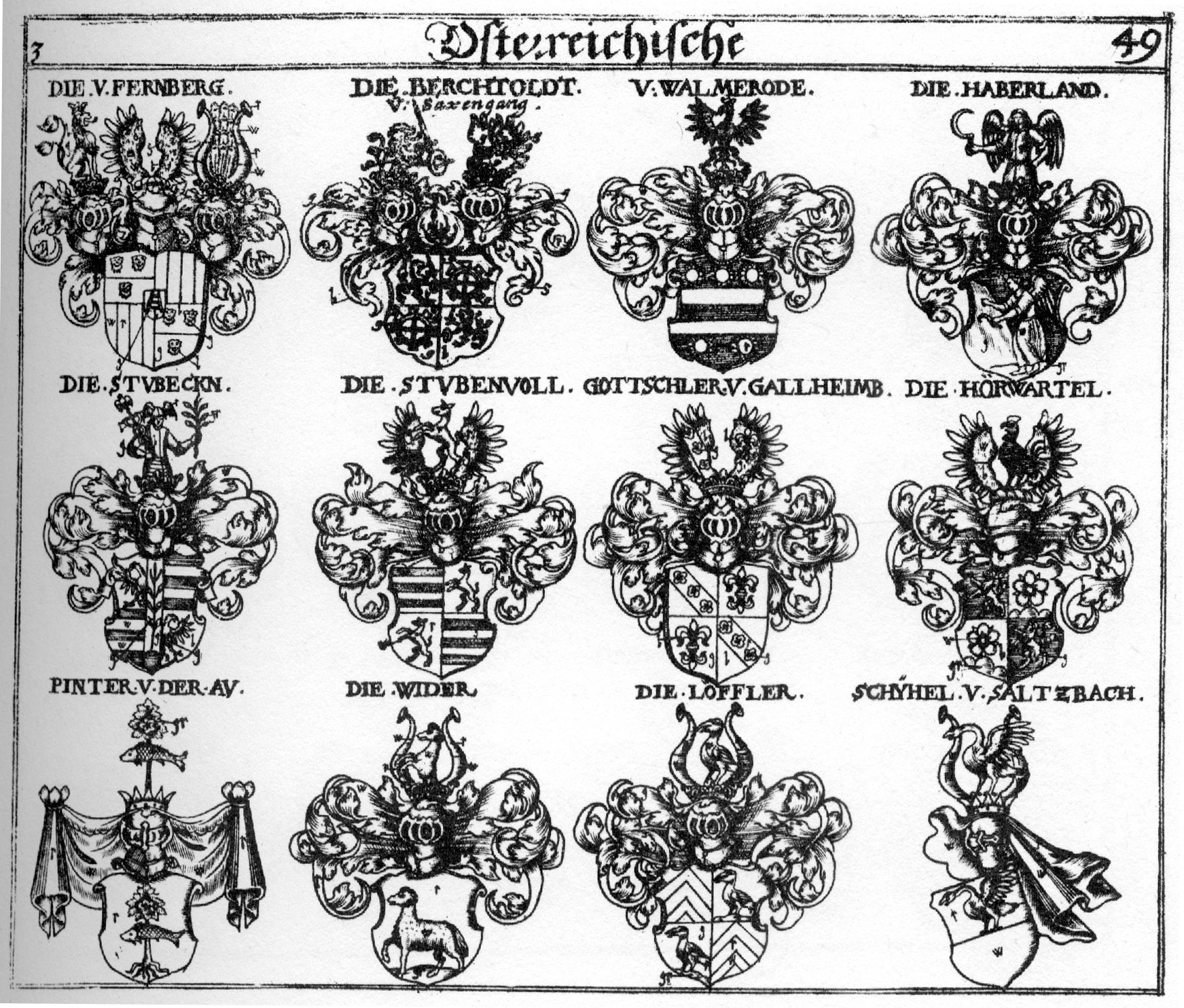 Siebmachers Wappenbuch, Tafeln der 9. Ausgabe 1701 und der 10. Ausgabe 1705, nach dem Faksimile von 1975. Tafel aus Teil 3.